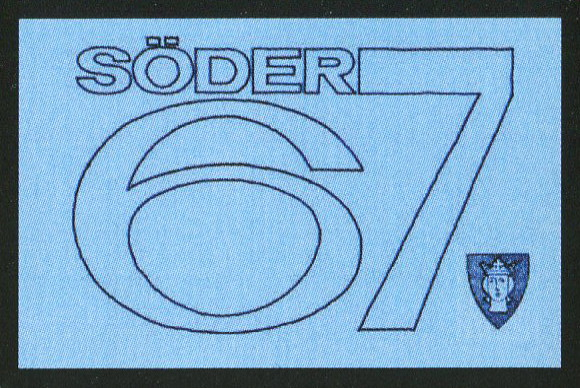 Emblem för utredningen "Söder 67"